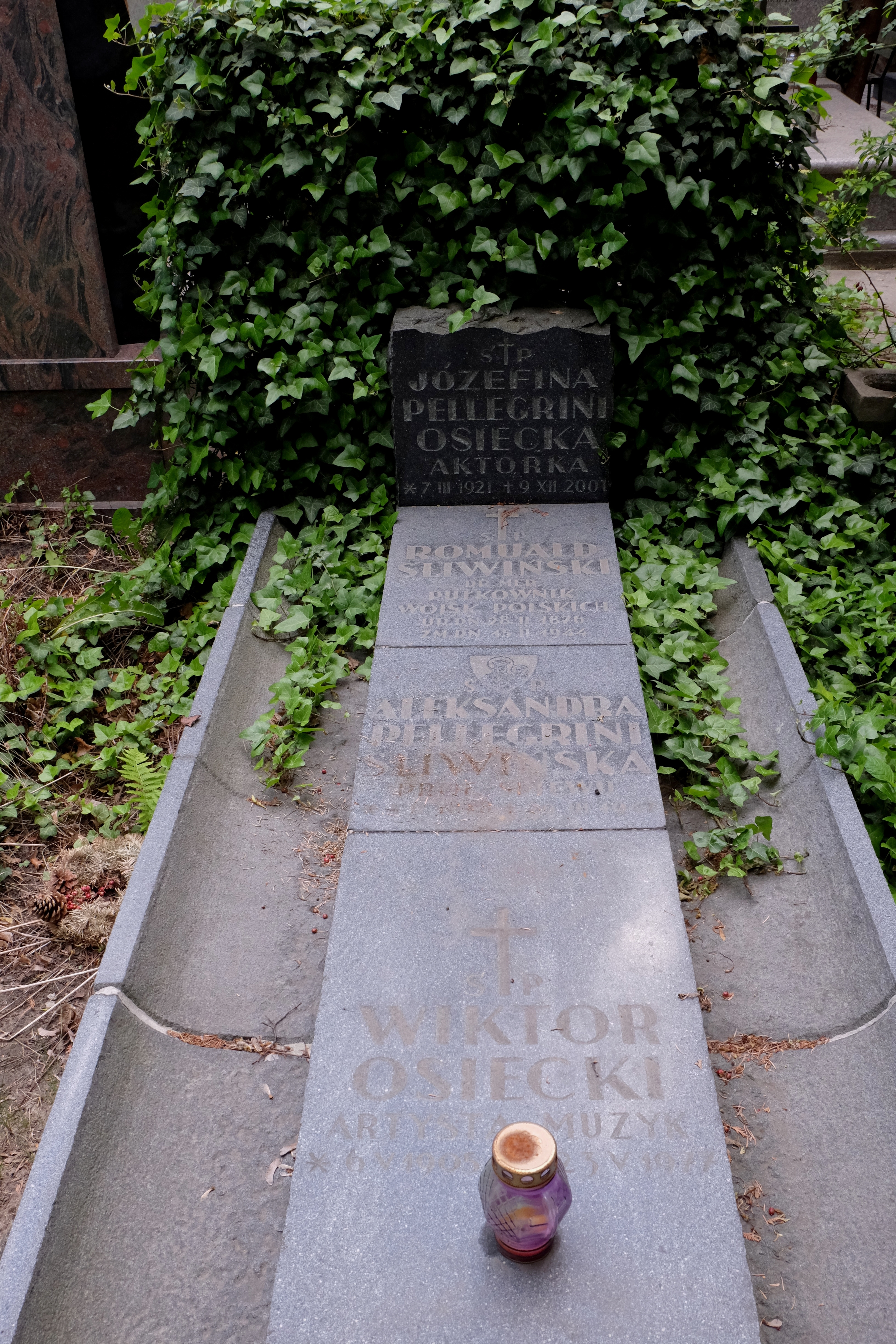 Grób śpiewaczki Józefiny Pellegrini-Osieckiej i kompozytora Wiktora Osieckiego na Cmentarzu Wojskowym na Powązkach w Warszawie